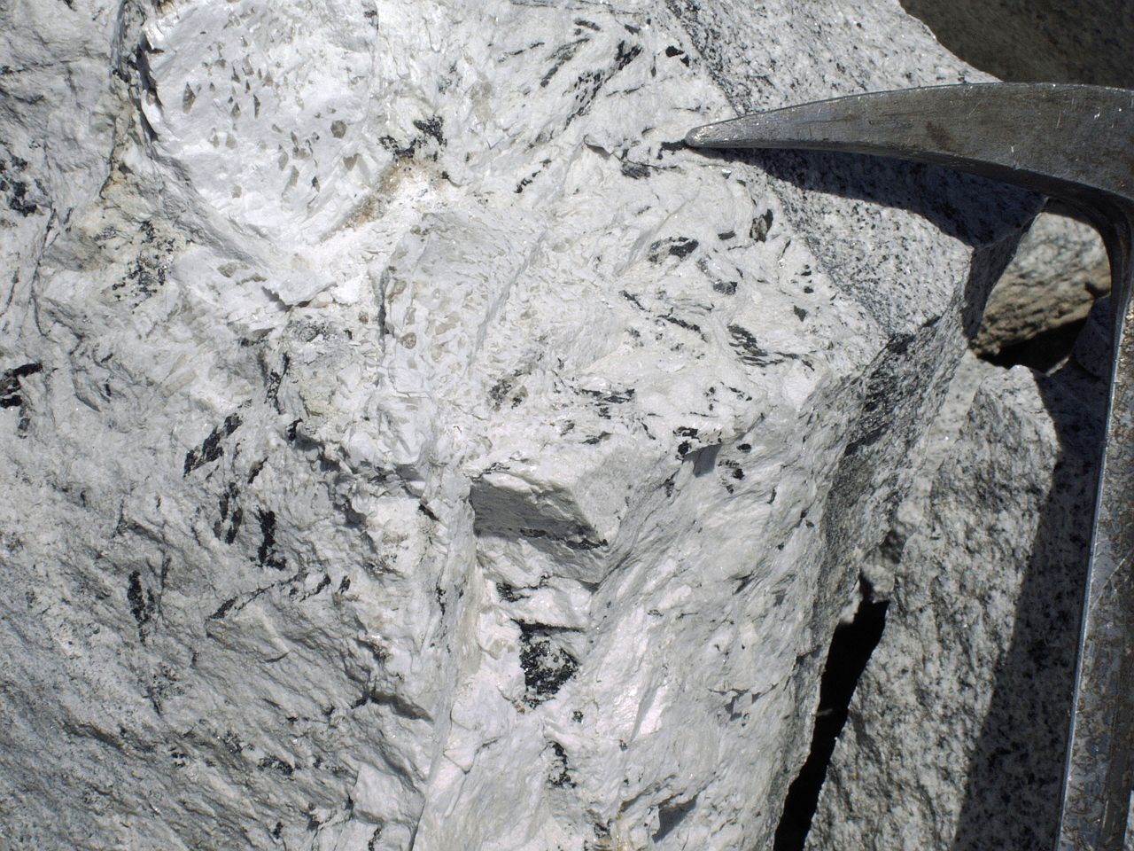 Pegmatyt, przerosty pismowe kwarcu z albitem. Widoczny także czarny klinochlor.